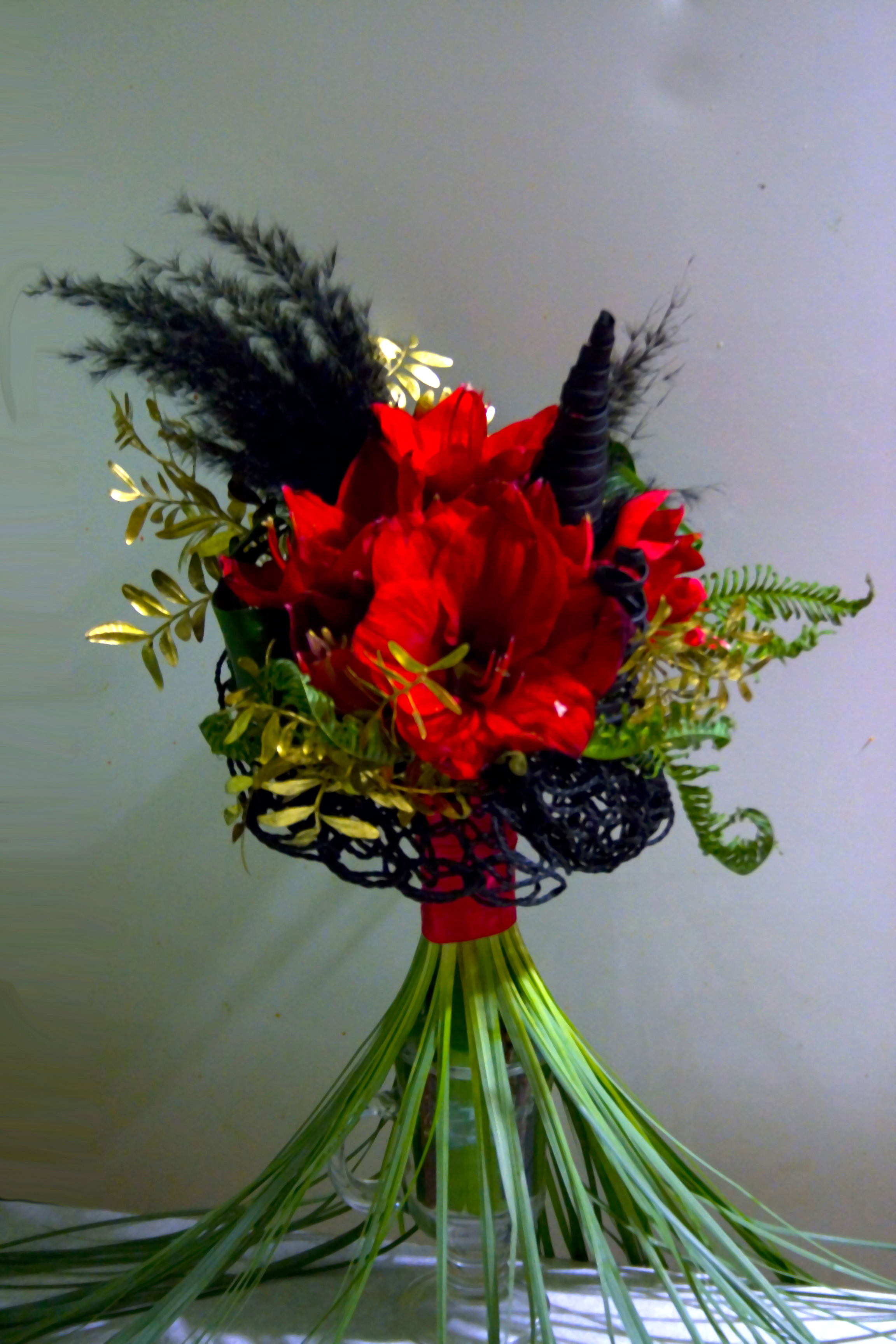 Букет с церемонии награждения "Премия Рунета'09"